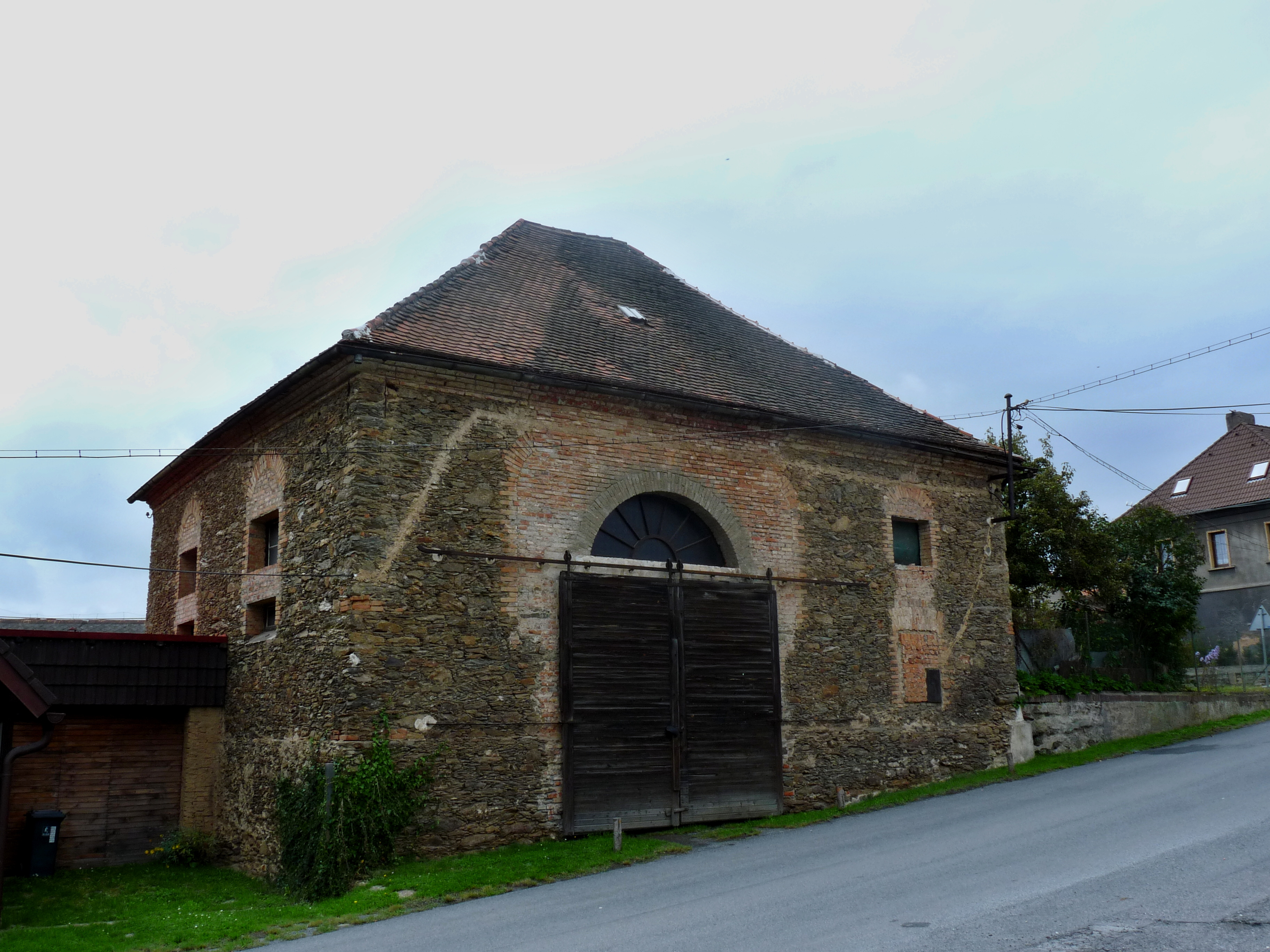 Synagoga, Plzeňská, Bezdružice.